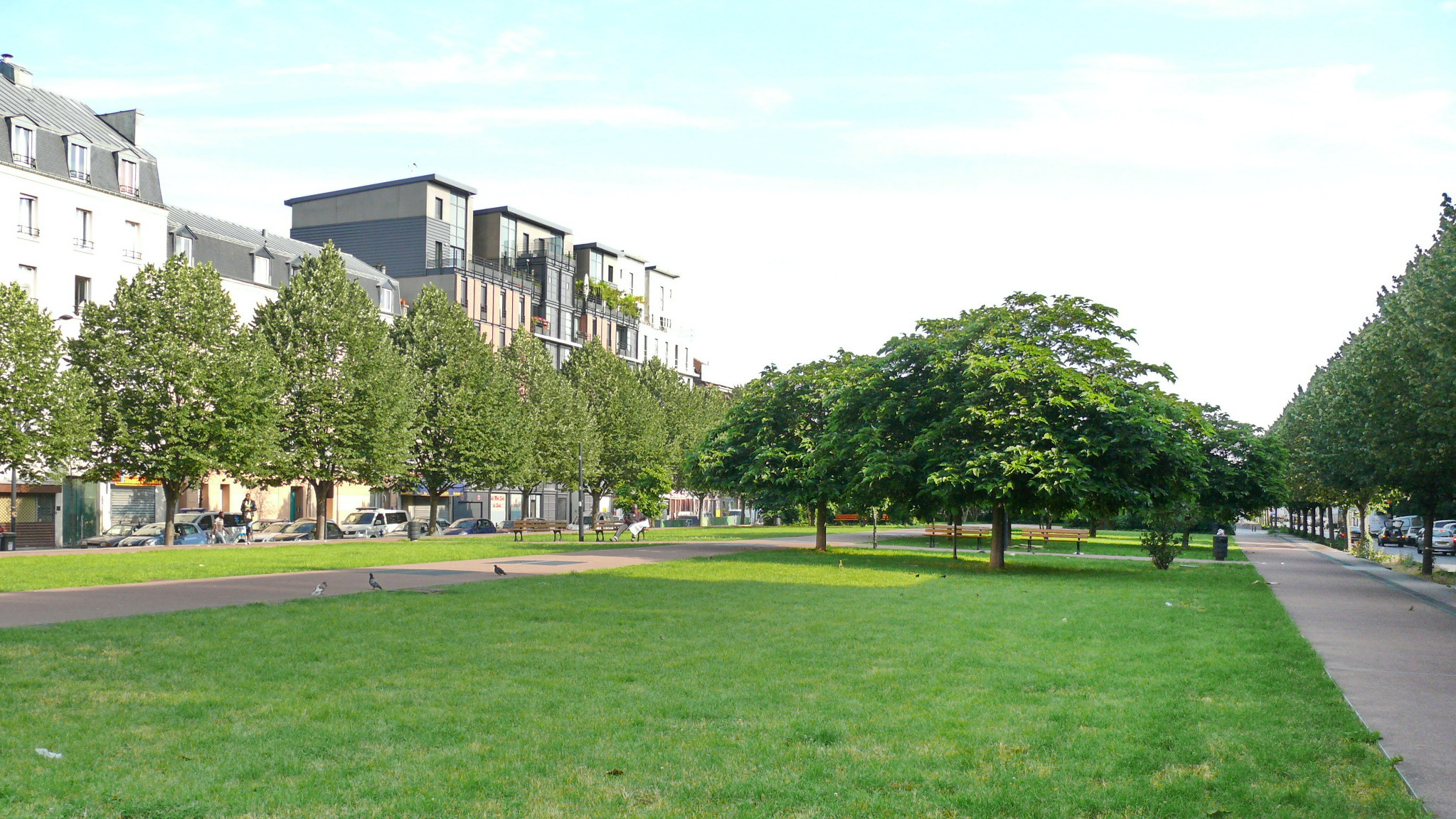 La Plaine Saint-Denis (Saint-Denis, Seine-Saint-Denis, France) : La couverture de l'Autoroute A1 a permis de créer une promenade plantée qui permet de réunir les quartiers auparavant divisés par la tranchée autoroutière